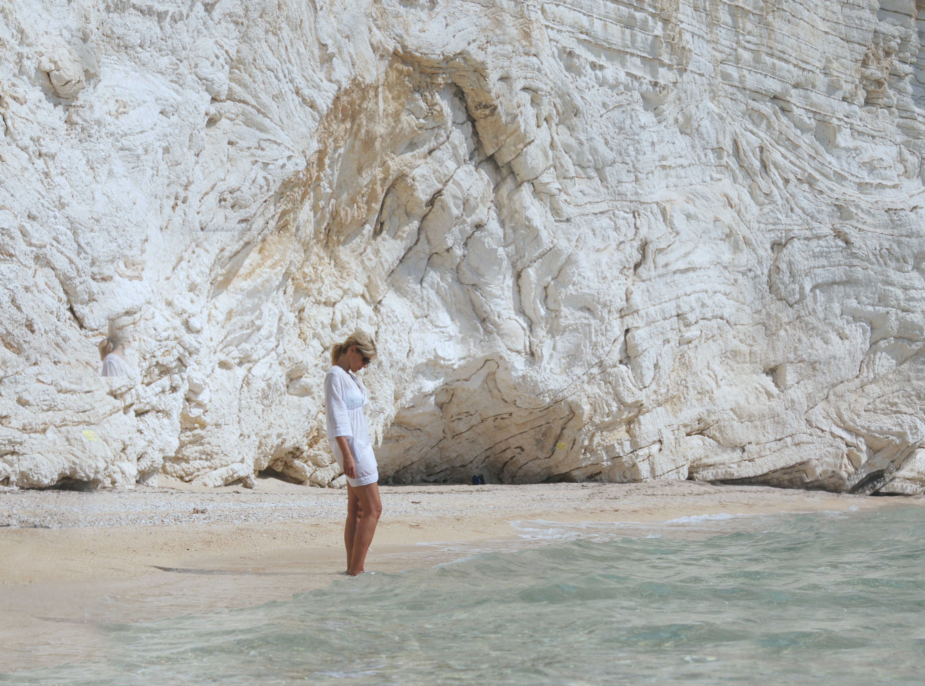 autore giuseppe palumbo 15 agosto 2014 baia delle zagare puglia vieste mattinata carmen fiano